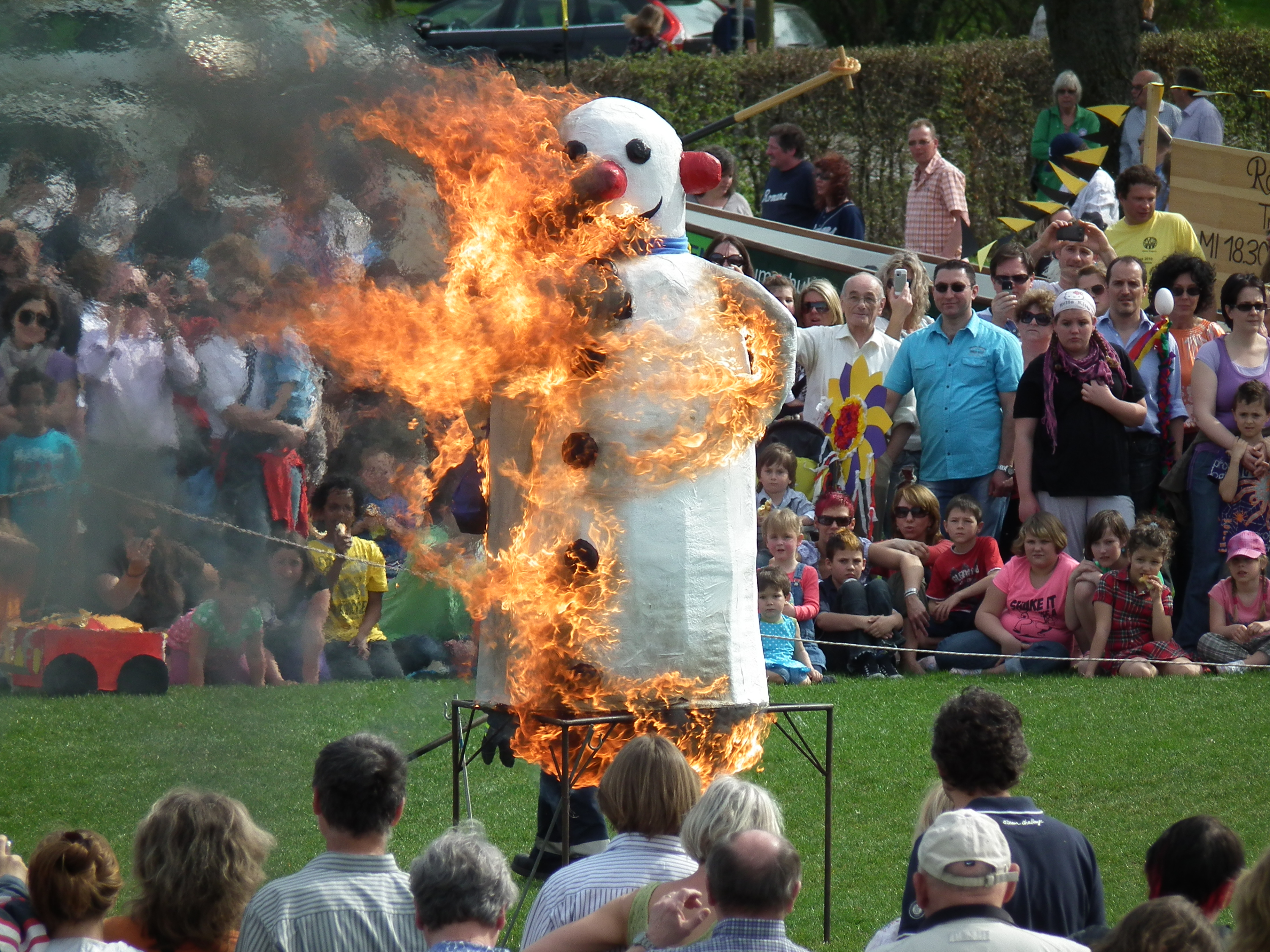 Zum Abschluß des Sommertagszugs in Ladenburg wird der Winter symbolisch verbrannt (Baden-Württemberg, Deutschland)